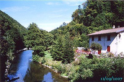 Dichiaro sotto la mia totale responsabilità di essere l'autore di questa foto. Si tratta di una mia ripresa effettuata nella località Setteponti di Pracchia, Pistoia, il pomeriggio del 12 settembre 2007. Il corso d'acqua è il fiume Reno che si dirige verso l'Emilia. Autorizzo l'utilizzazione della foto secondo quanto prescrivono i Regolamenti in materia emanati da Wikipedia. Dati tecnici: Pentax ME con 28 mm su pellicola a 200 ISO. La foto è stata riutilizzata, con colori virati in bianco e nero, nell'opera a stampa: Pracchia sul Reno - Il Principe e il Poeta a pag. 99 in apertura del capitolo "Lo straniero", pubblicato nel 2009 dall'editrice MEF - Firenze Atheneum.